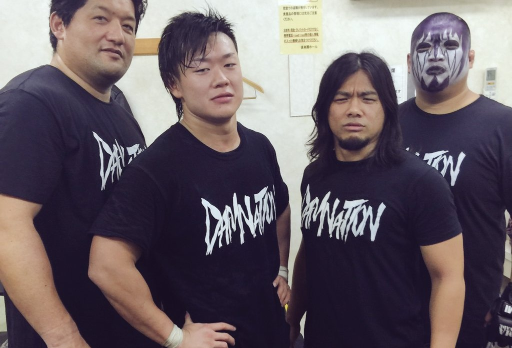 DDTプロレスリングのユニット